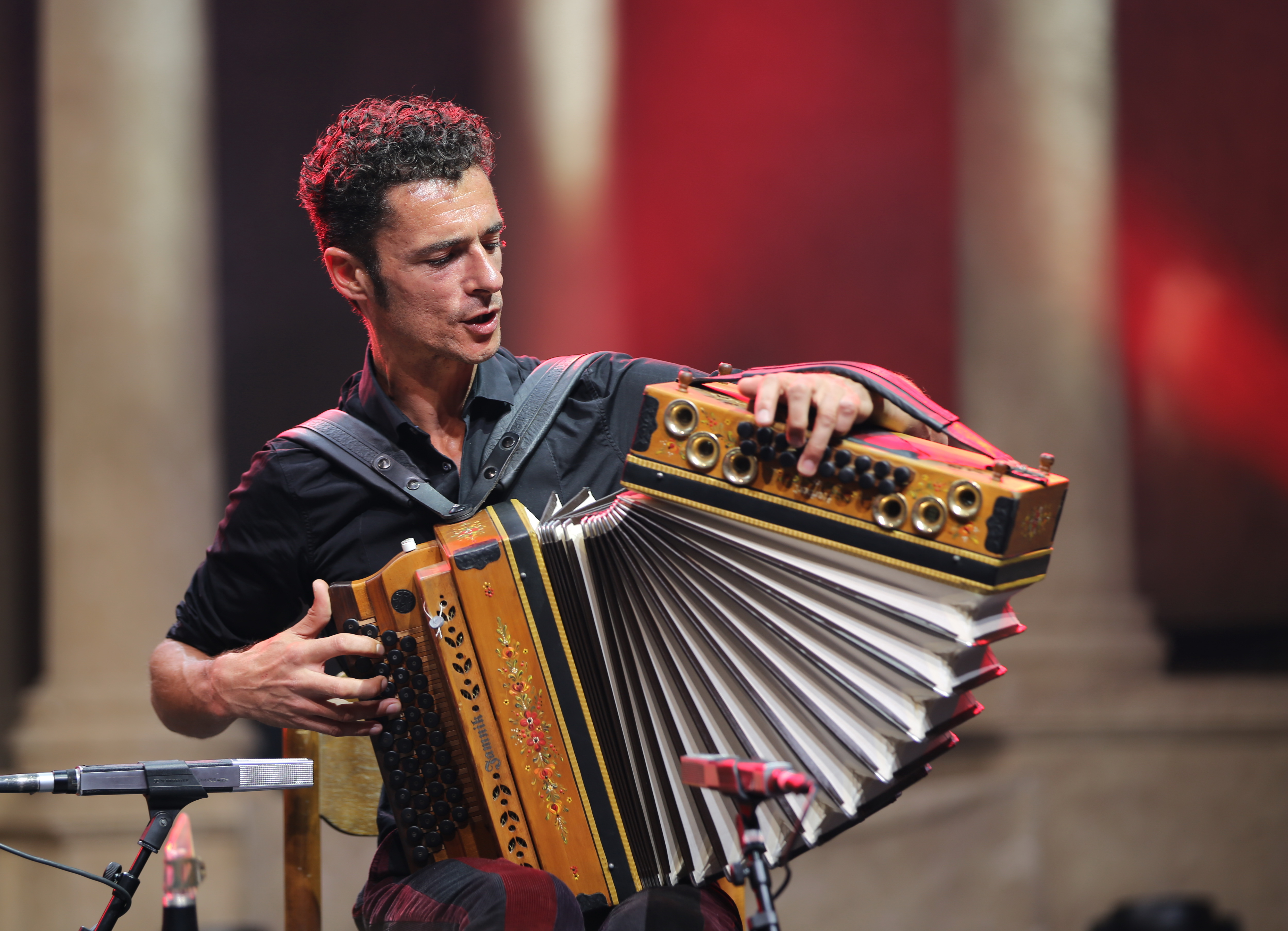 Herbert Pixner Projekt auf dem Heimatsound Festival 2016, im Bild: Herbert Pixner mit Steirischer Harmonika. Festivalsommer This photo was created with the support of donations to Wikimedia Deutschland in the context of the CPB project "Festival Summer". This file is made available under the Creative Commons CC0 1.0 Universal Public Domain Dedication. The person who associated a work with this deed has dedicated the work to the public domain by waiving all of their rights to the work worldwide under copyright law, including all related and neighboring rights, to the extent allowed by law. You can copy, modify, distribute and perform the work, even for commercial purposes, all without asking permission. Thomas Springer Personality rights warningAlthough this work is freely licensed or in the public domain, the person(s) shown may have rights that legally restrict certain re-uses unless those depicted consent to such uses. In these cases, a model release or other evidence of consent could protect you from infringement claims.